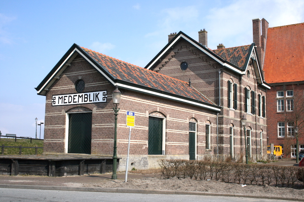 Station Medemblik zuidwestzijde; 30 maart 2013. Foto: Erik Swierstra.